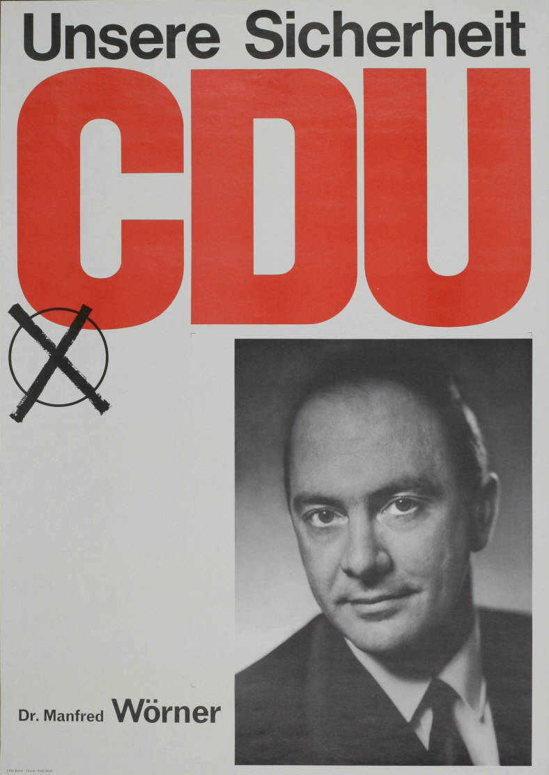 Unsere Sicherheit CDU Dr. Manfred Wörner Abbildung: Porträtfoto - Stimmkreuz Plakatart: Kandidaten-/Personenplakat mit Porträt Auftraggeber: CDU, Bonn Drucker_Druckart_Druckort: KVD, Köln Objekt-Signatur: 10-001 : 1286 Bestand: Plakate zu Bundestagswahlen (10-001) GliederungBestand10-18: Plakate zu Bundestagswahlen (10-001) » Die 5. Bundestagswahl am 19. September 1965 » CDU » Mit Porträtfoto Lizenz: KAS/ACDP 10-001 : 1286 CC-BY-SA 3.0 DE